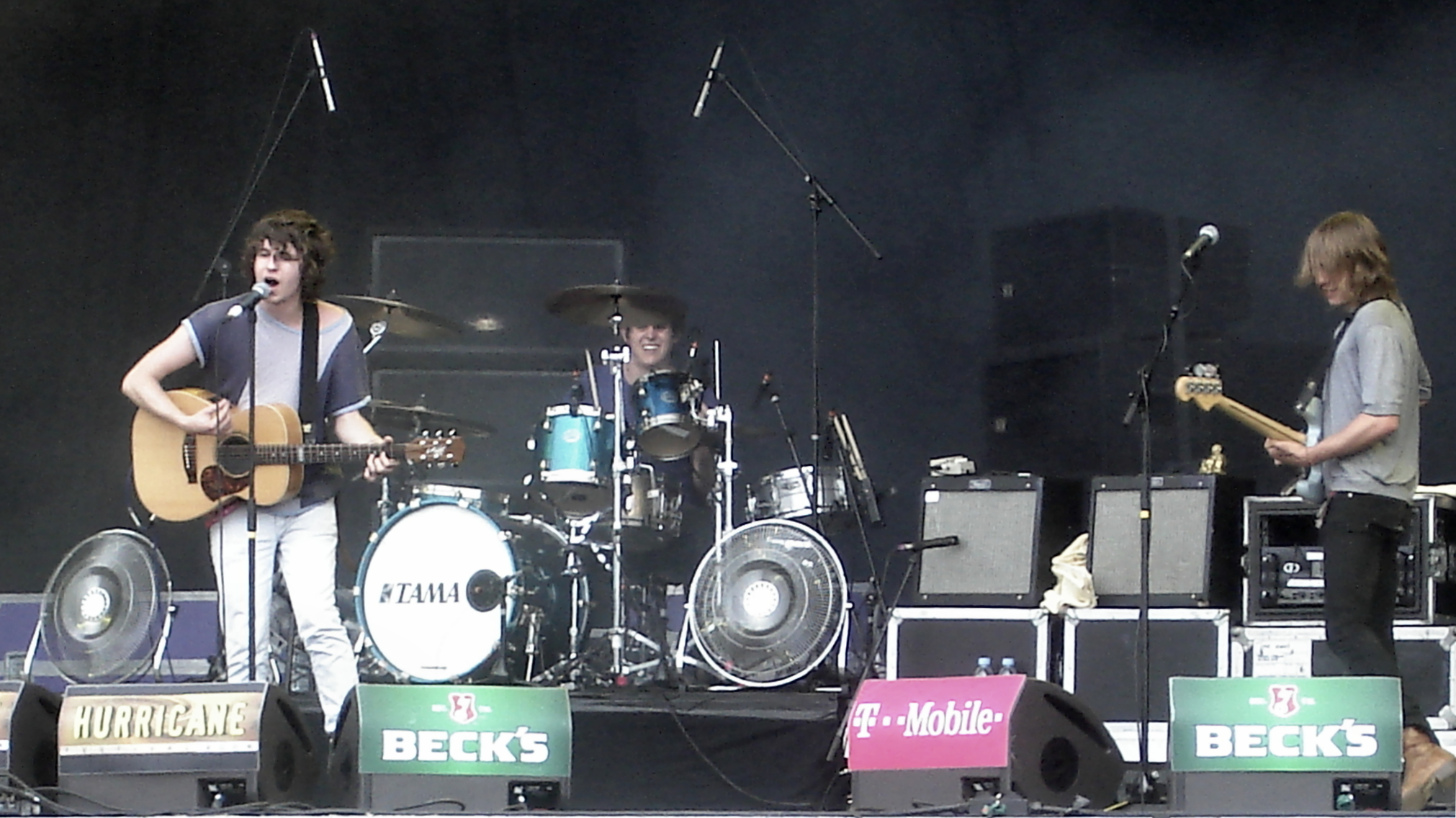 The Kooks beim Hurricane-Festival 2006 auf der Greenstage